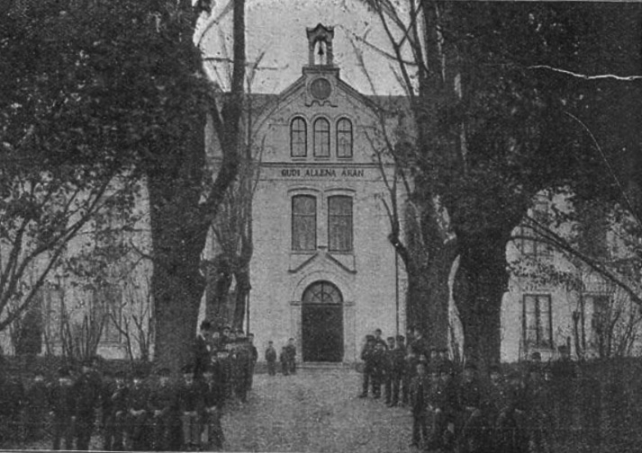 Stockholms stadsmissions barnhem vid Norrtullsgatan 20 (senare Idungatan 1-3)